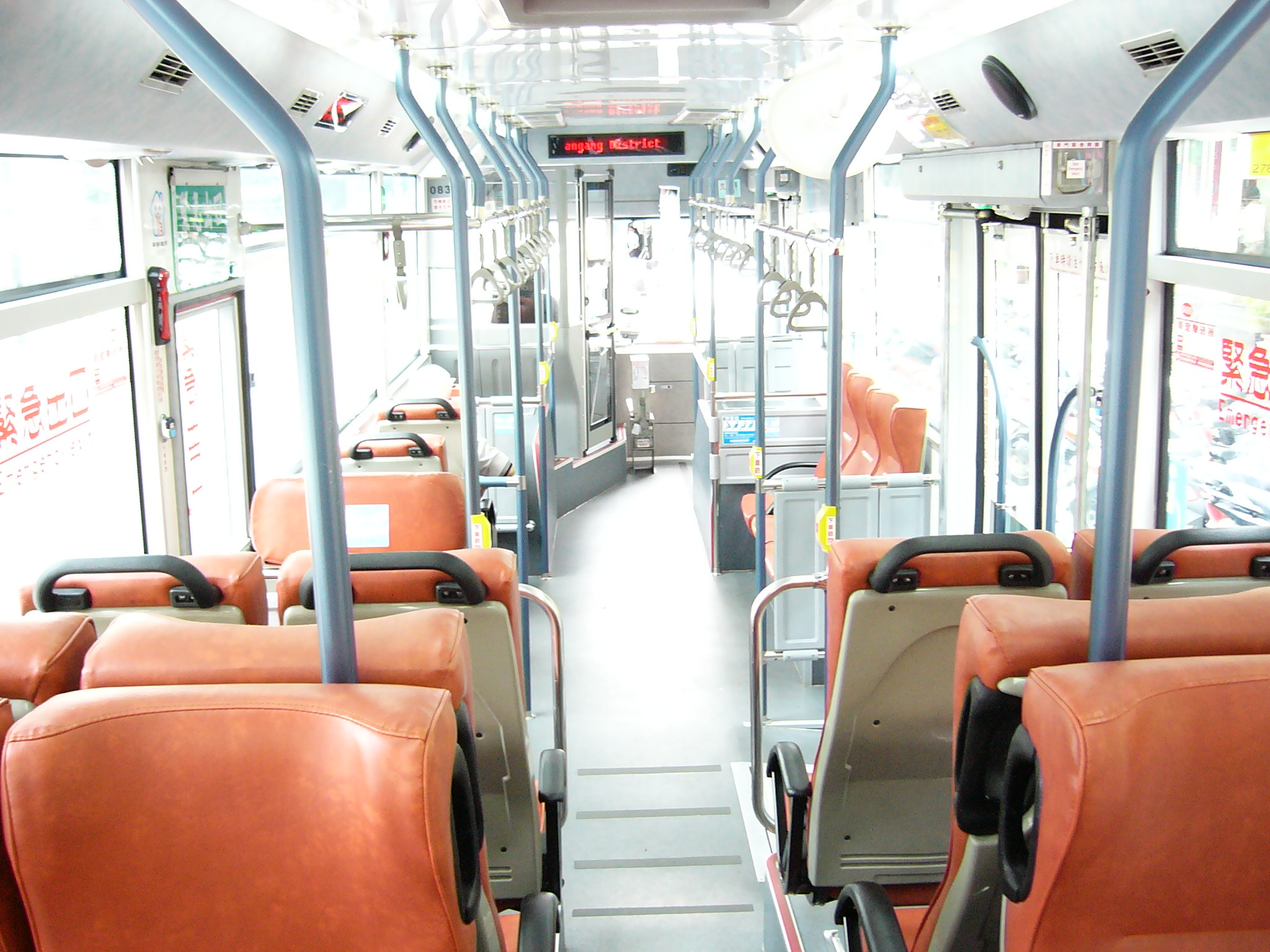 首都客運的Daewoo BS120CN大客車的內裝，本車車號為083-FQ